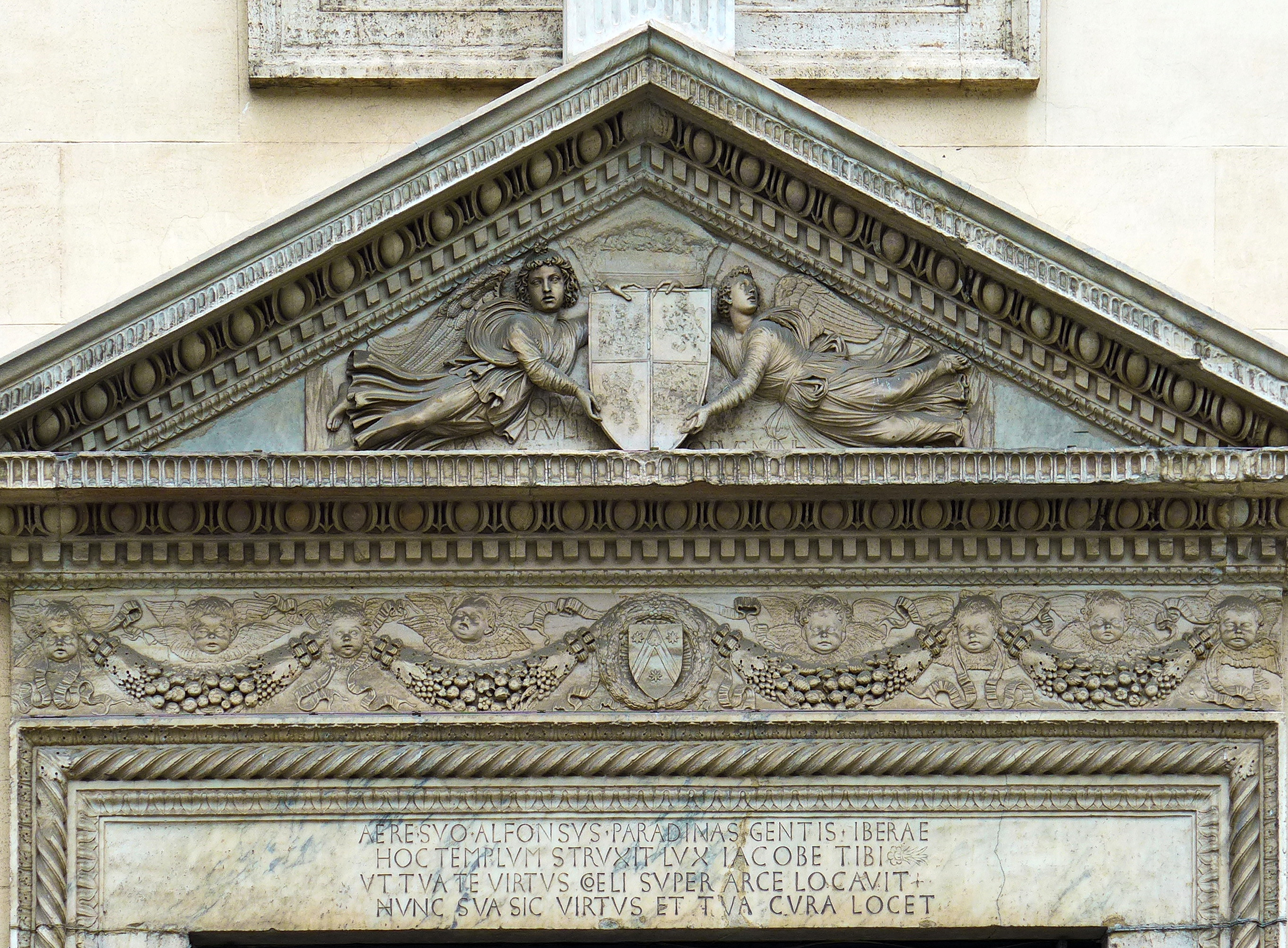 Tympanon der Kirche Nostra Signora del Sacro Cuore, früher San Giacomo degli Spagnoli; Piazza Navona, Rom